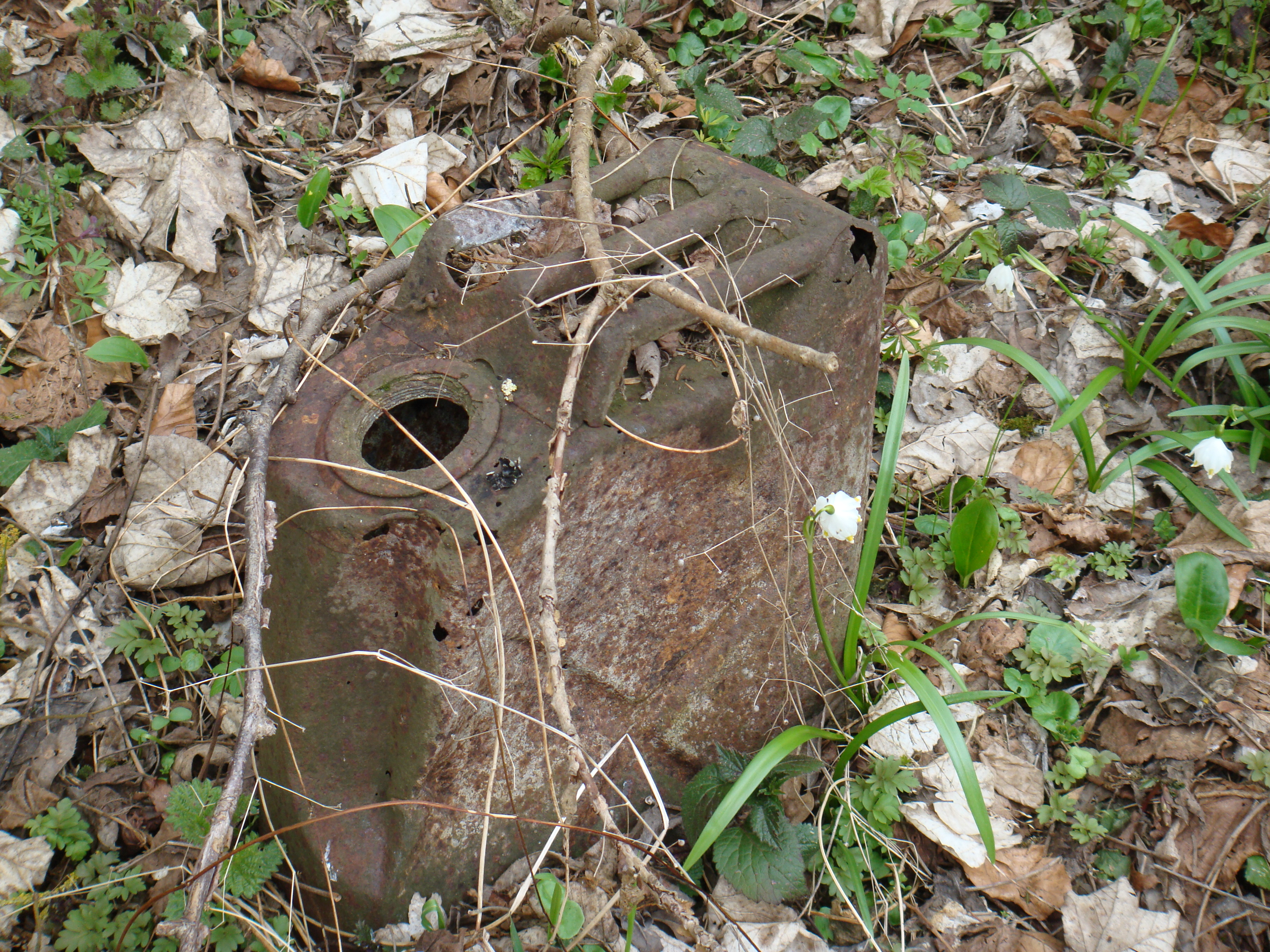 Alter Amerikanischer Jerrycan auf dem Standortübungsplatz Dornstadt im Tobeltal